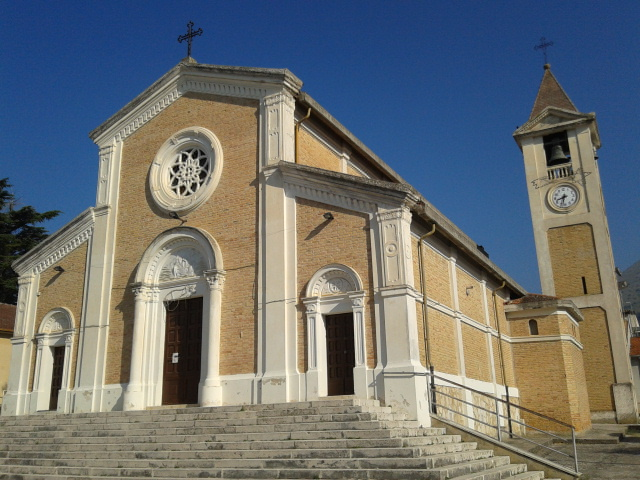 Chiesa dei Ss. Fabiano e Sabastiano